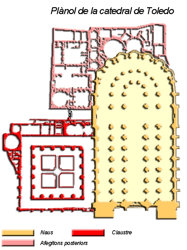 Plànol de la catedral de Toledo